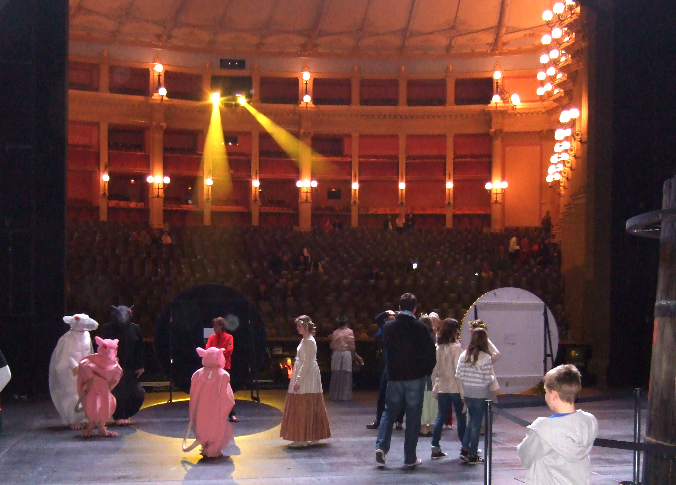 Festspielhaus Bayreuth: Blick von der Bühne zum Zuschauerraum am Tag der offenen Tür 2014